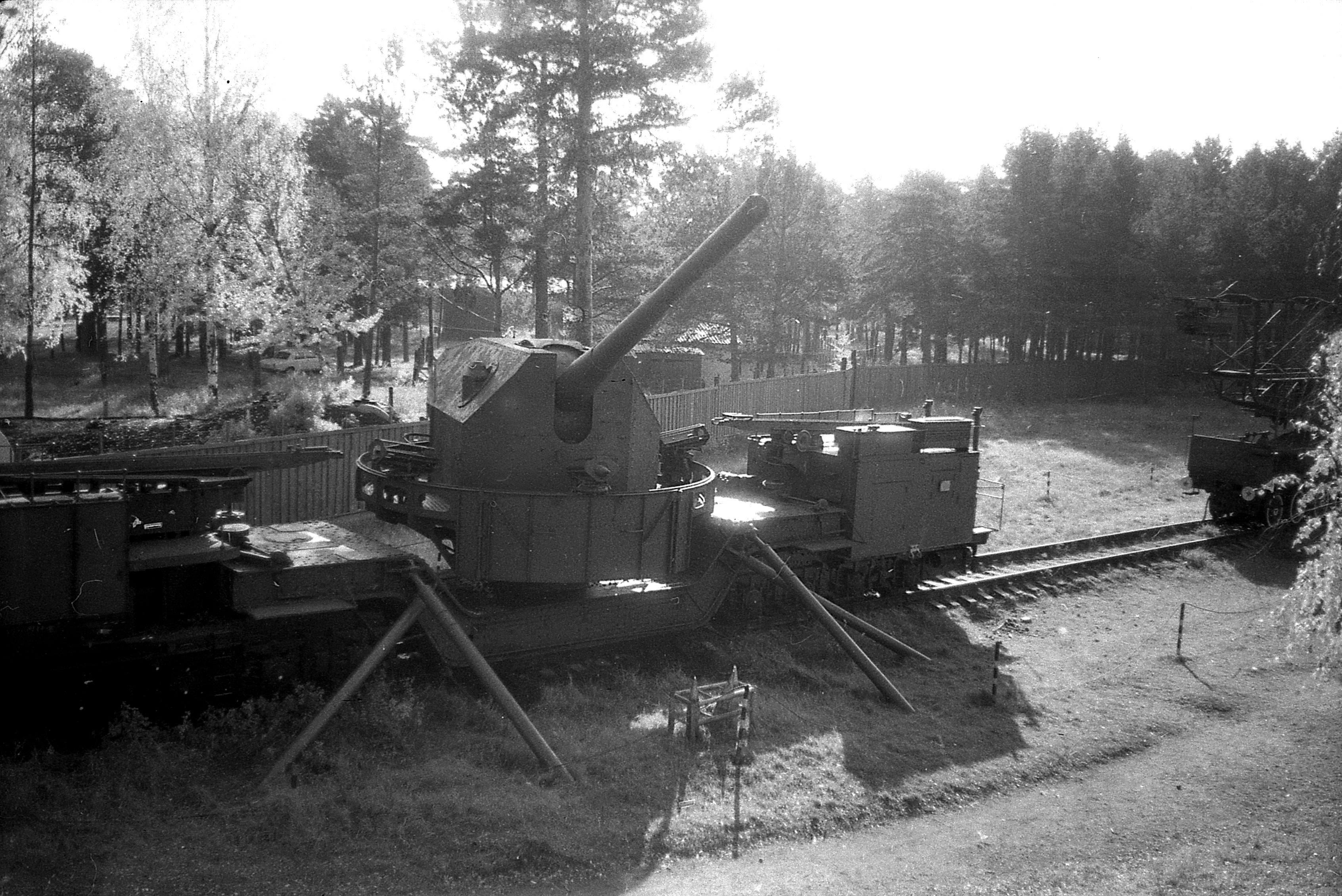 180 мм орудие на ж.д.транспортёре. Форт "Красная горка"